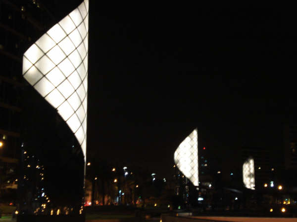 Diseño Exterior - Larcomar, Lima.